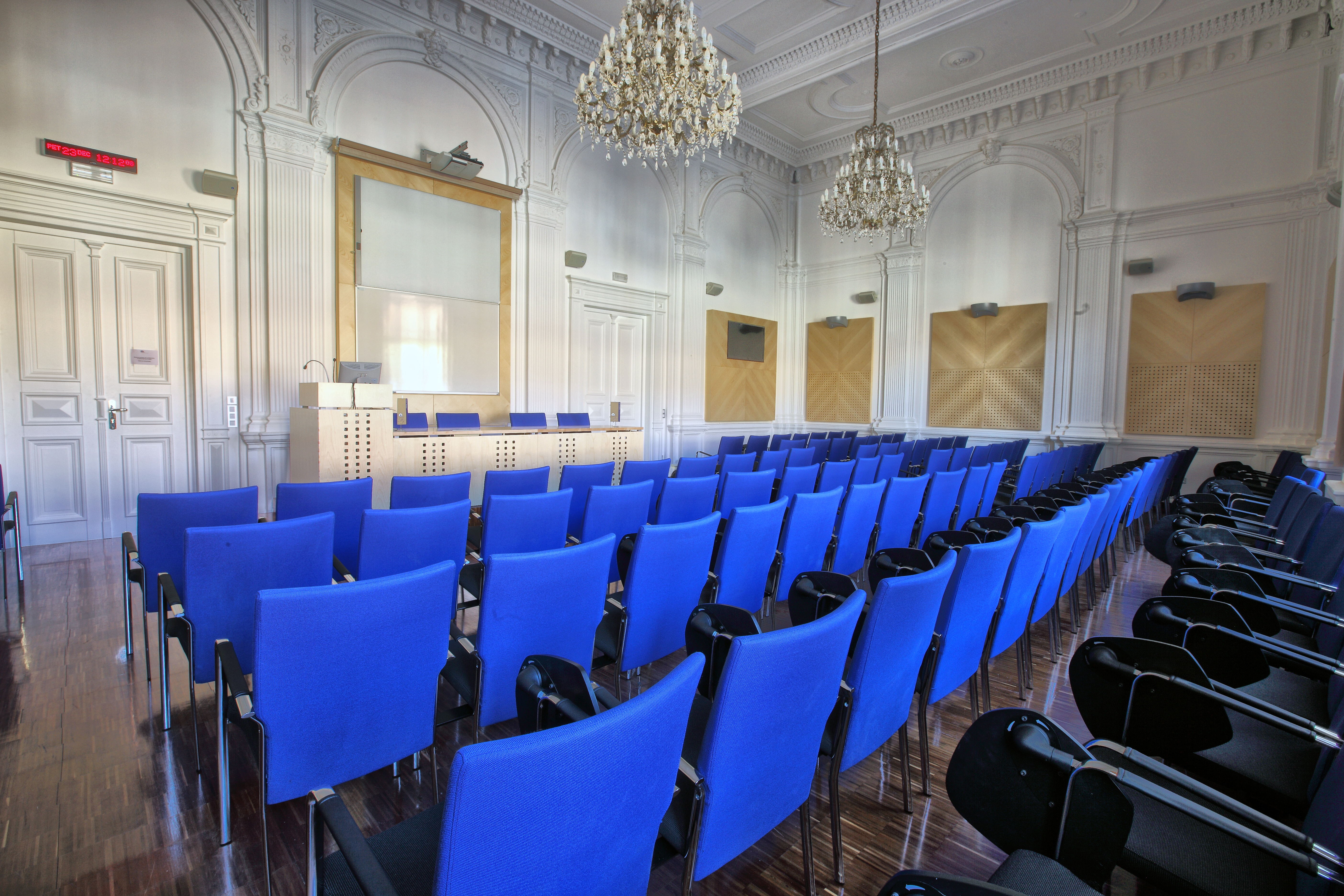 Auditorium Maximum